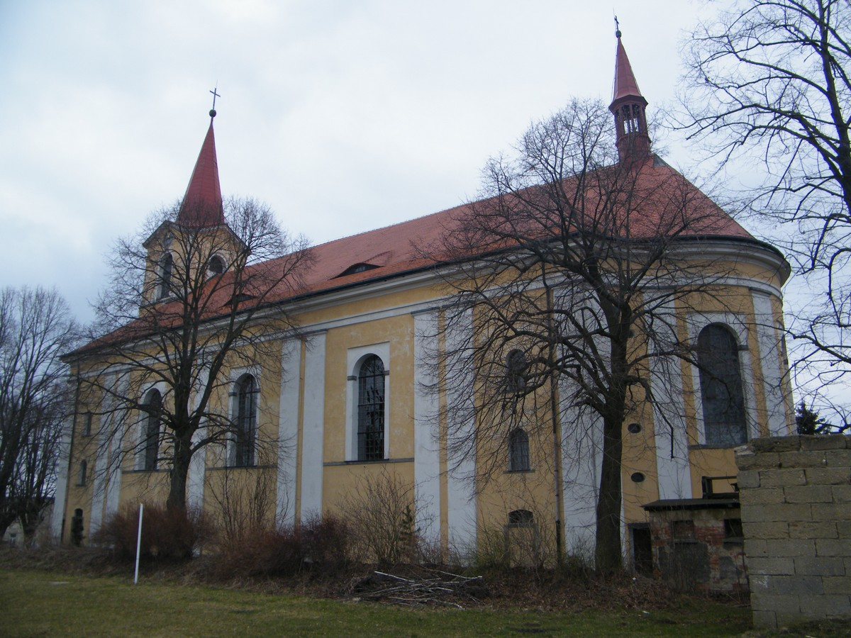 Kostel svatého Vavřince v Království u Šluknova